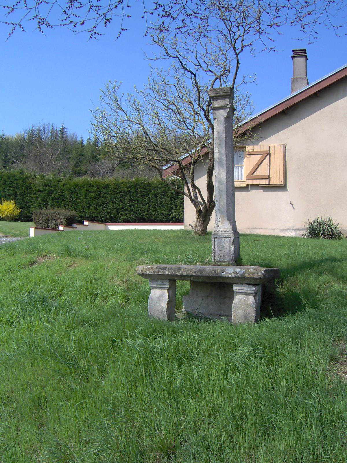 croix calcaire 1619 vilcey-sur-Trey